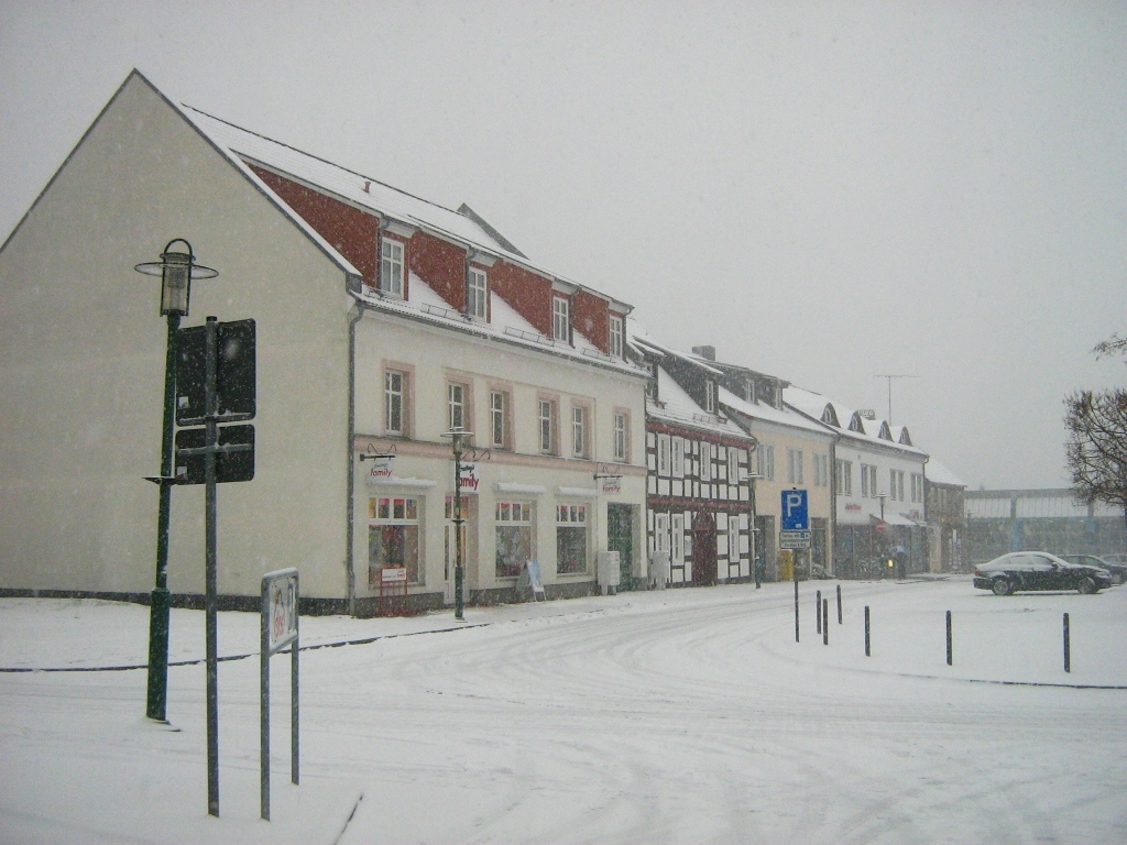 Marktplatz in Strasburg (Landkreis Uecker-Randow).